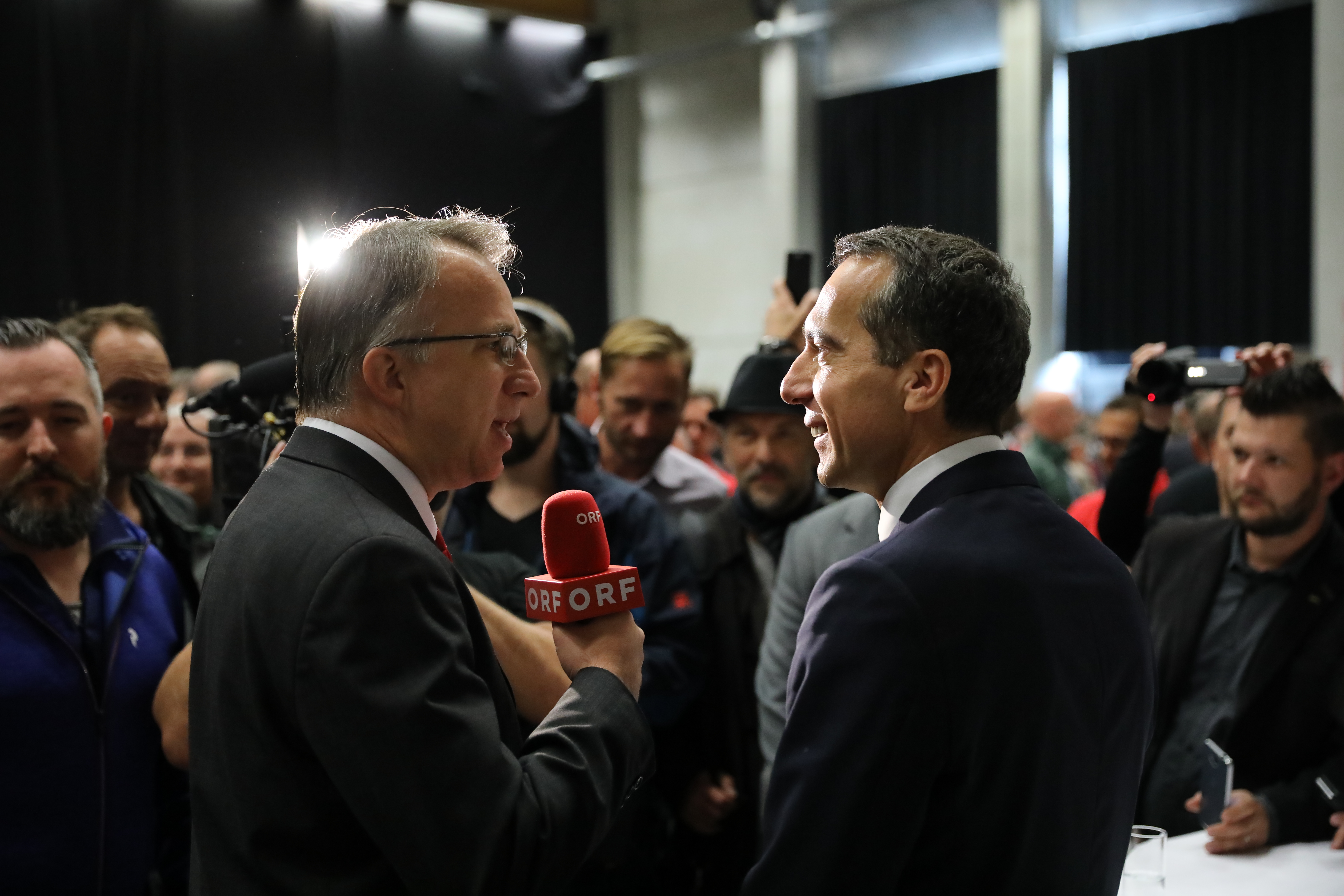 Am 26.9 war Bundeskanzler Christian Kern unterwegs in Niederösterreich und hielt eine Rede bei PRO-GE-BetriebsrätInnen-Konferenz in St. Pölten (Fotos: SPÖ/Zach-Kiesling).